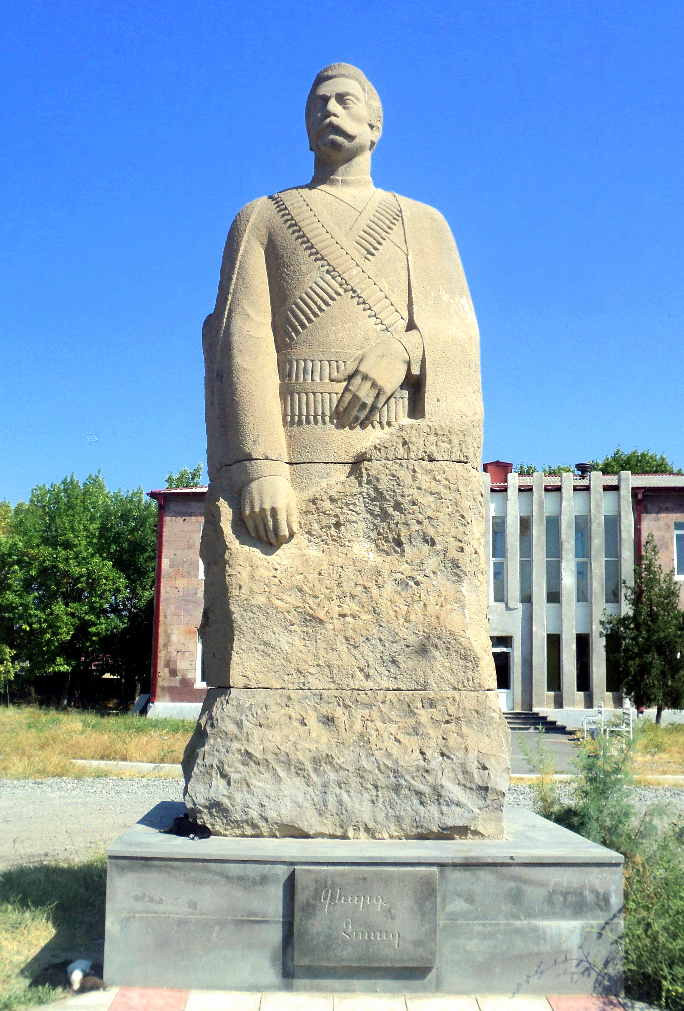 Քանդակագործ` Հովհաննես Մուրադյան